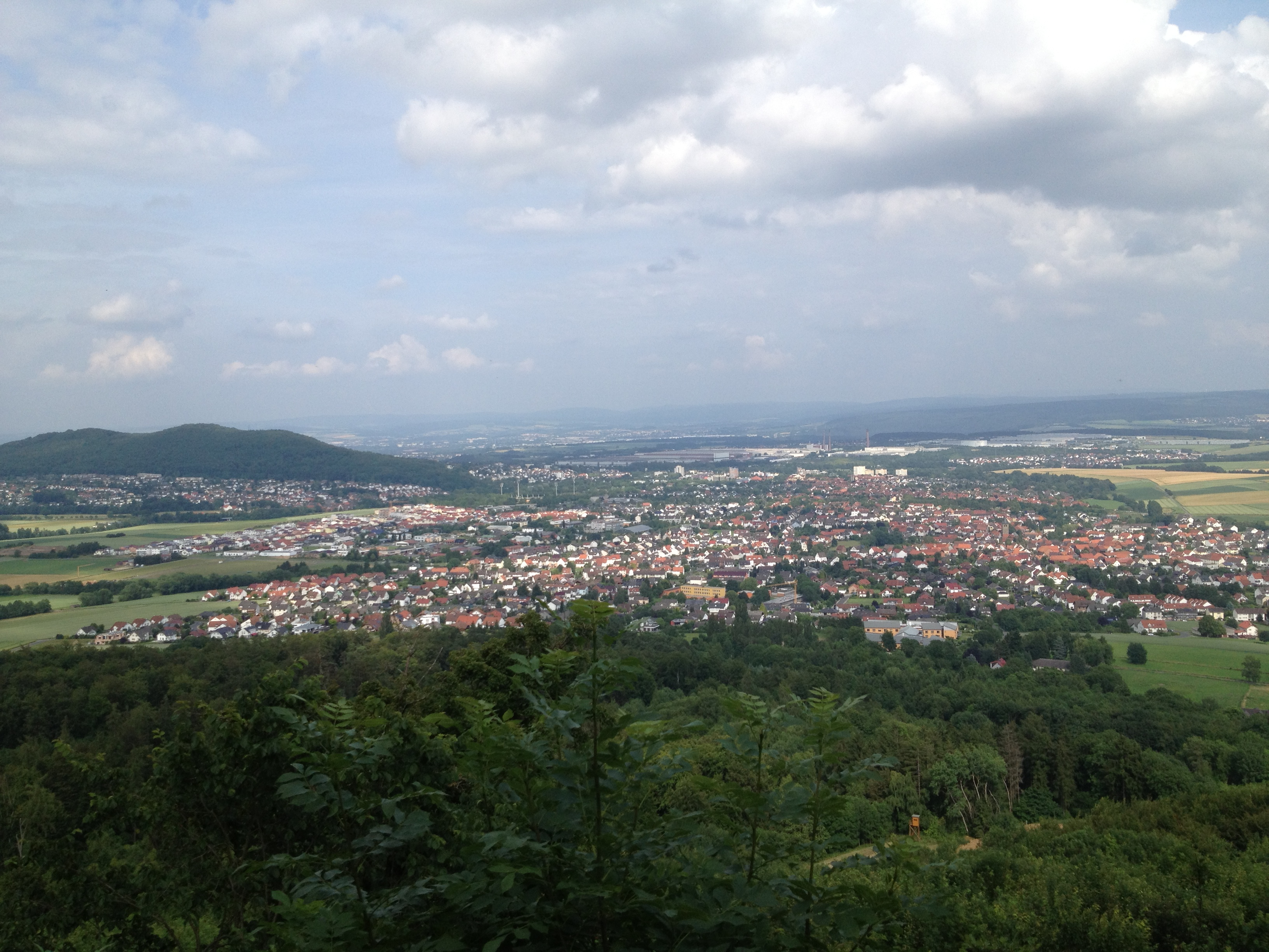 Kassel-Steig nahe Burgberg